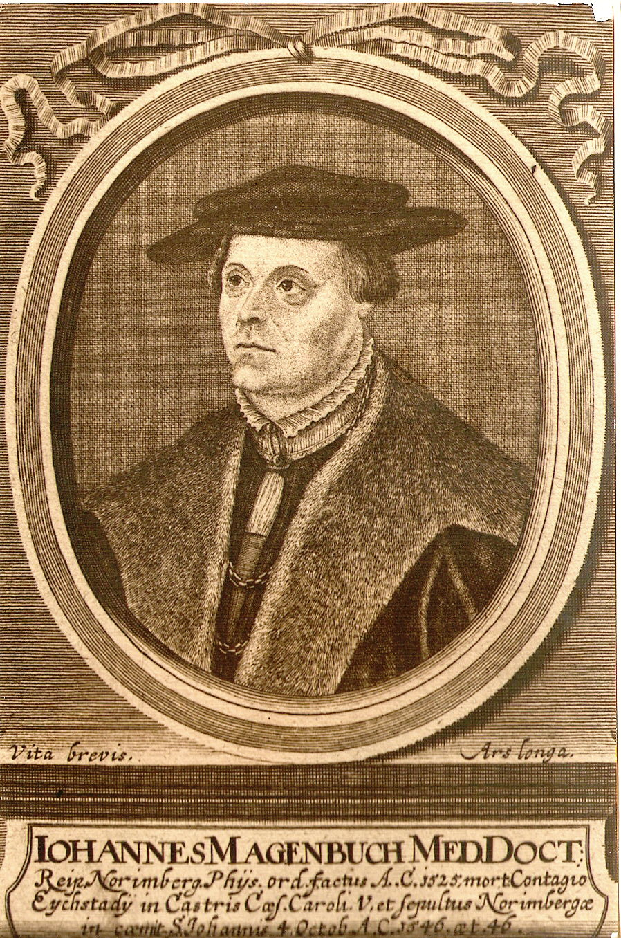 Portraitaufnahme